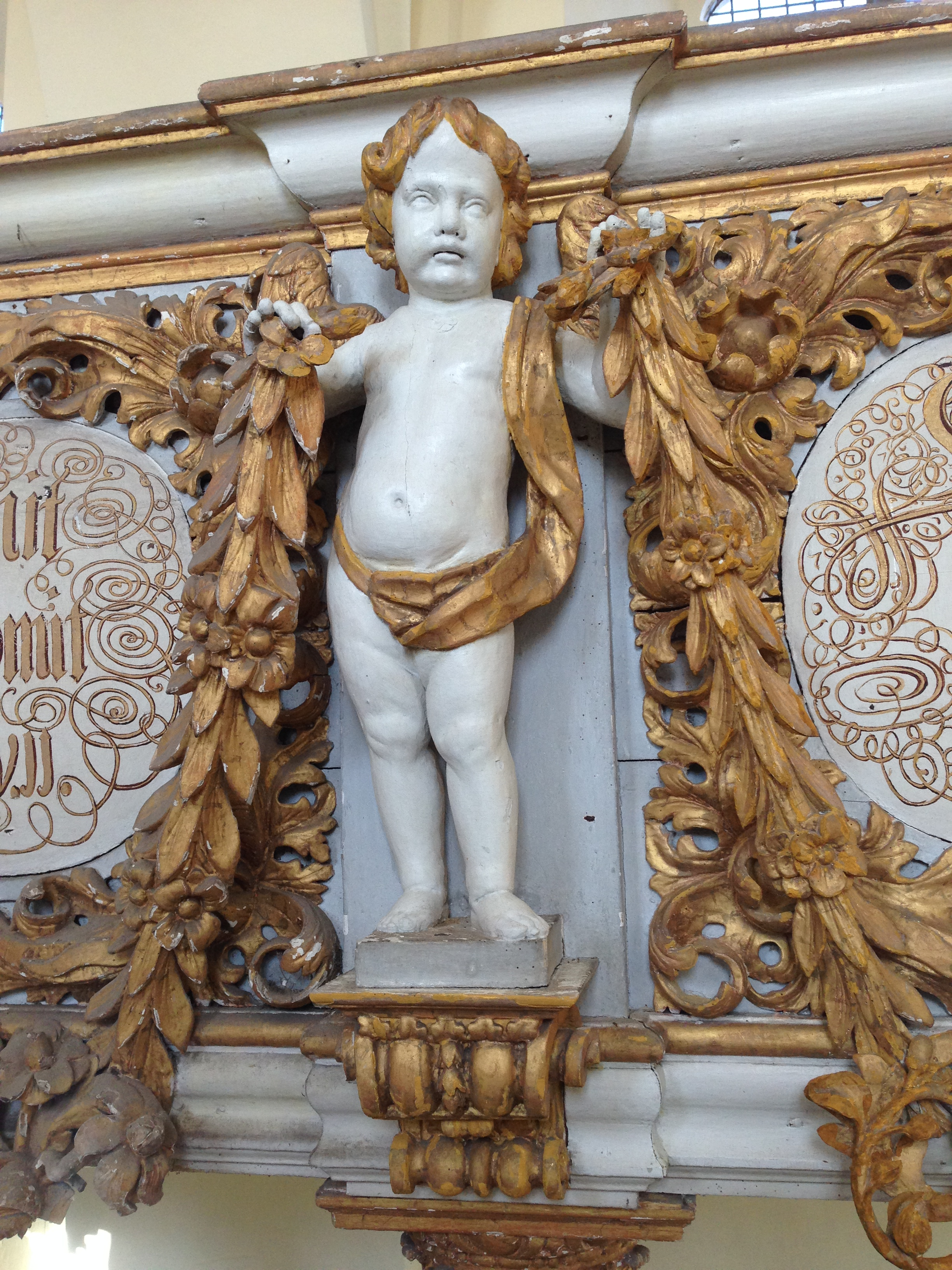 Dorfkirche Altenklitsche, Engel an der Emporenbrüstung (nach Restaurierung), Februar 2014